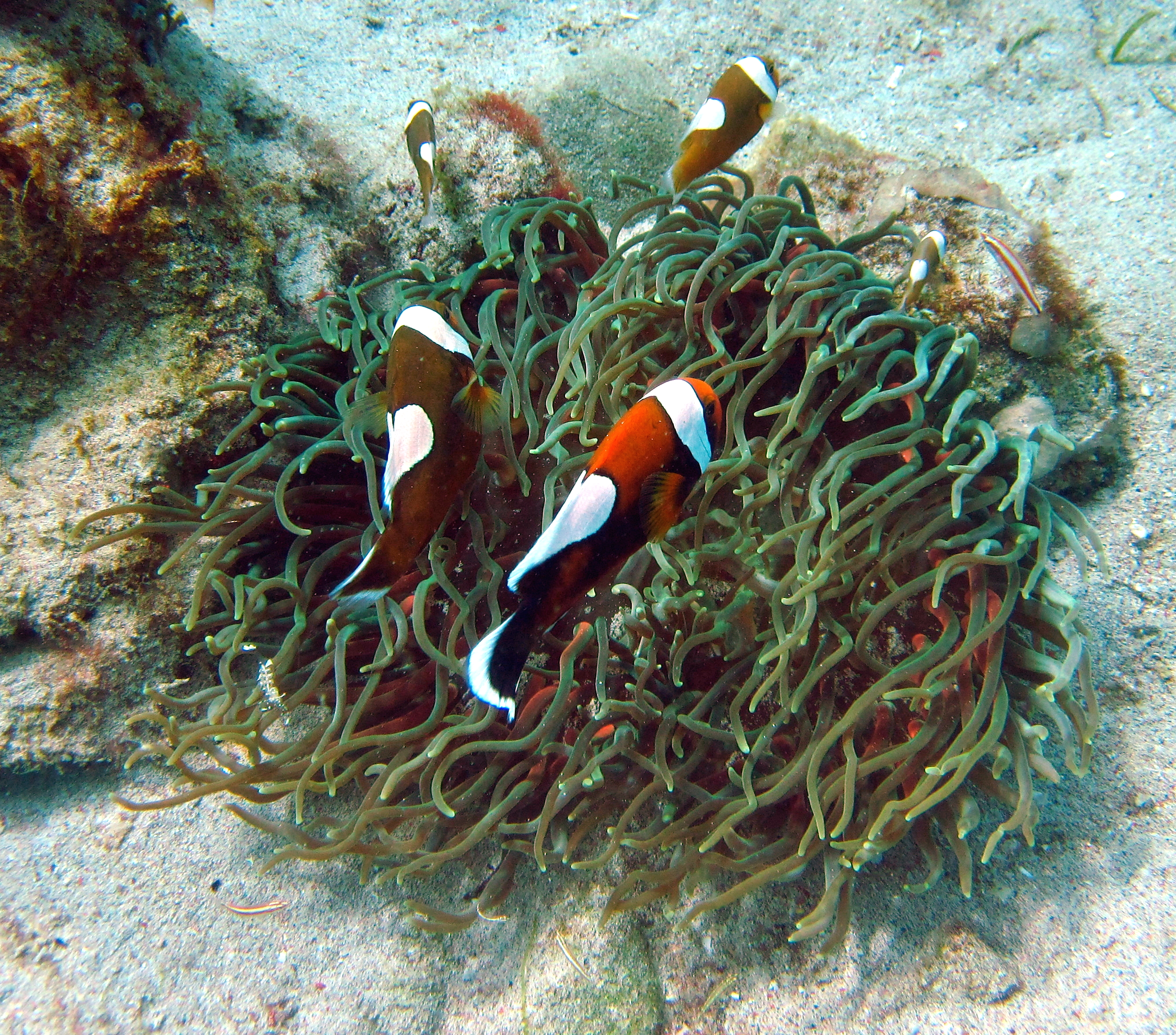 Grupo de Amphiprion polymnus en anémona Heteractis, Puerto Galera, Mimaropa, Filipinas